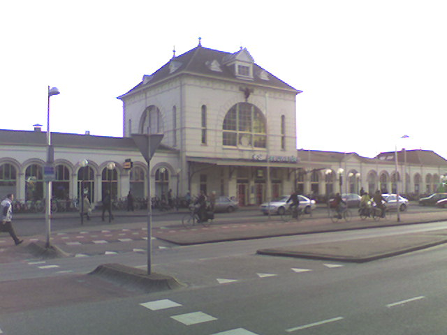 Het station van de Nederlands Spoorwegen in Leeuwarden, eigen werk maart 2006 The station of the Dutch Railways in Leeuwarden, own work march 2006